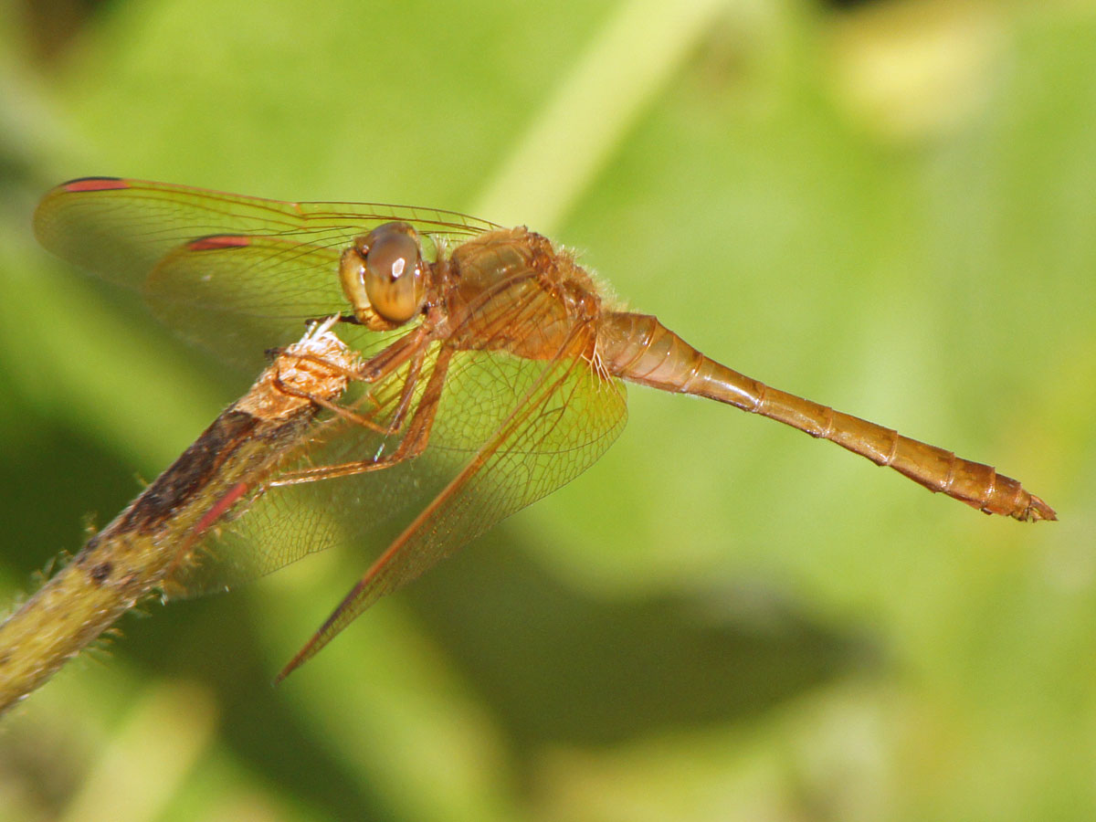 静止中のキトンボ。大阪府。